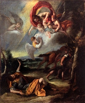 obra preparatòria de La conversión de San Pablo